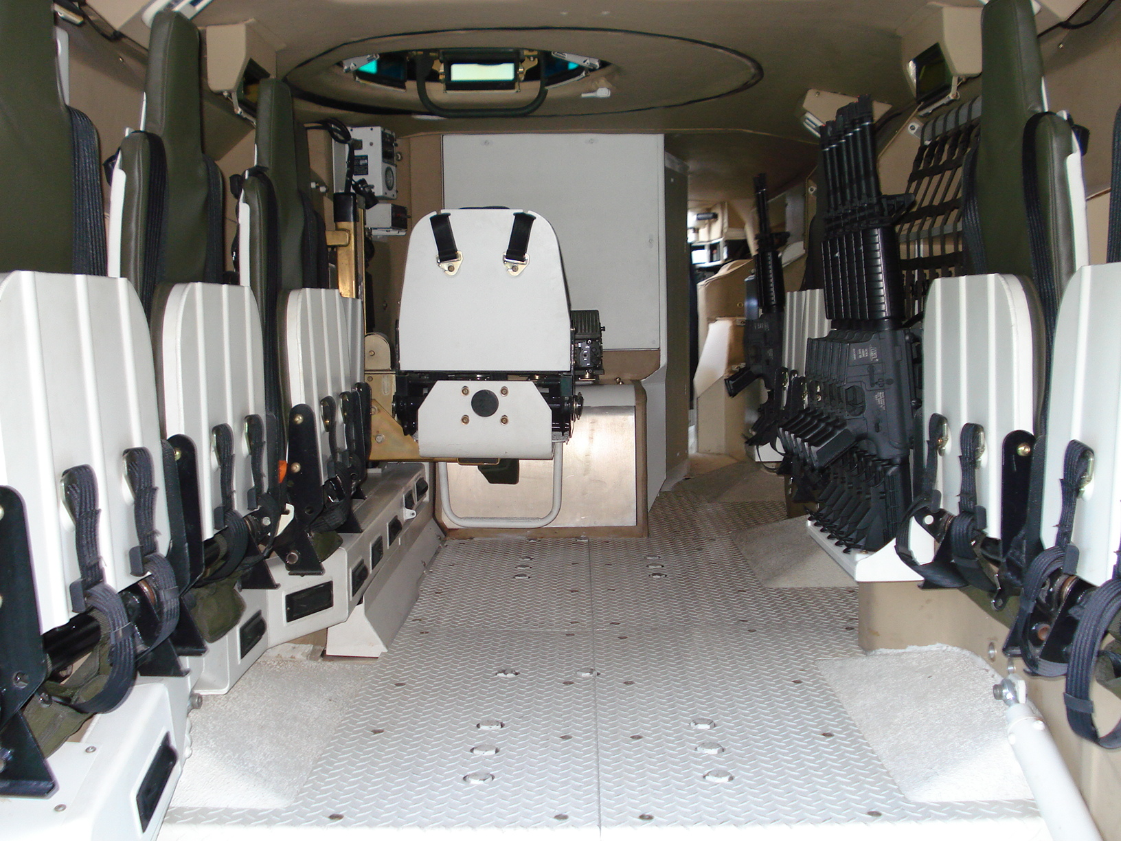 IDEF '07 Savunma Fuarı'nda çekildi.FNSS Pars. 23 Mayıs 2007